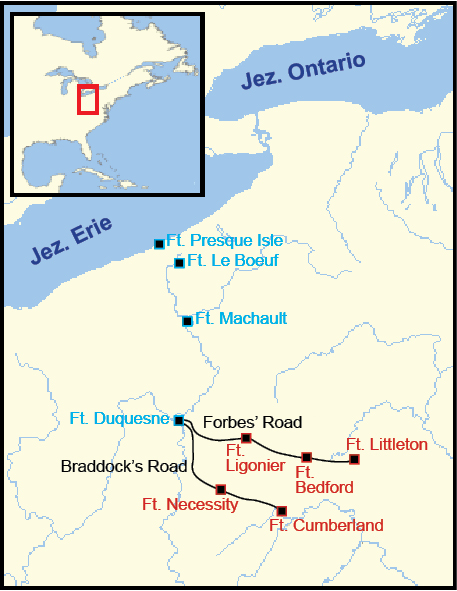 Mapa pokazuje pozycje francuskich (niebieski) i brytyjskich (czerwony) fortów w latach 1753-1758, oraz przybliżoną trasę Drogi Braddocka (Braddock's Road) i Forbesa (Forbes' Road).